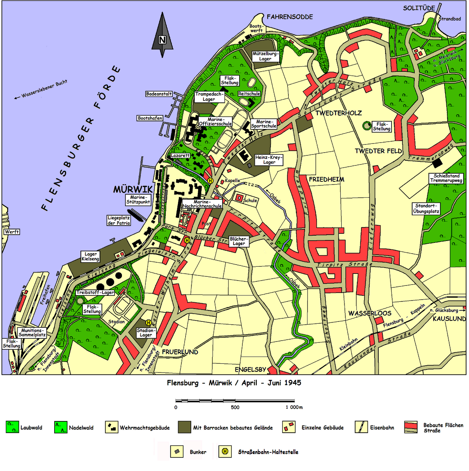 Die Karte kann unbedenklich veröffentlicht werden, da sie von mir selbst angefertigt wurde. Diese Karte zeigt den Flensburger Ortsteil Mürwik im Jahr 1945. Alle, den damaligen „Sonderbereich“ betreffenden Örtlichkeiten sind eingezeichnet.